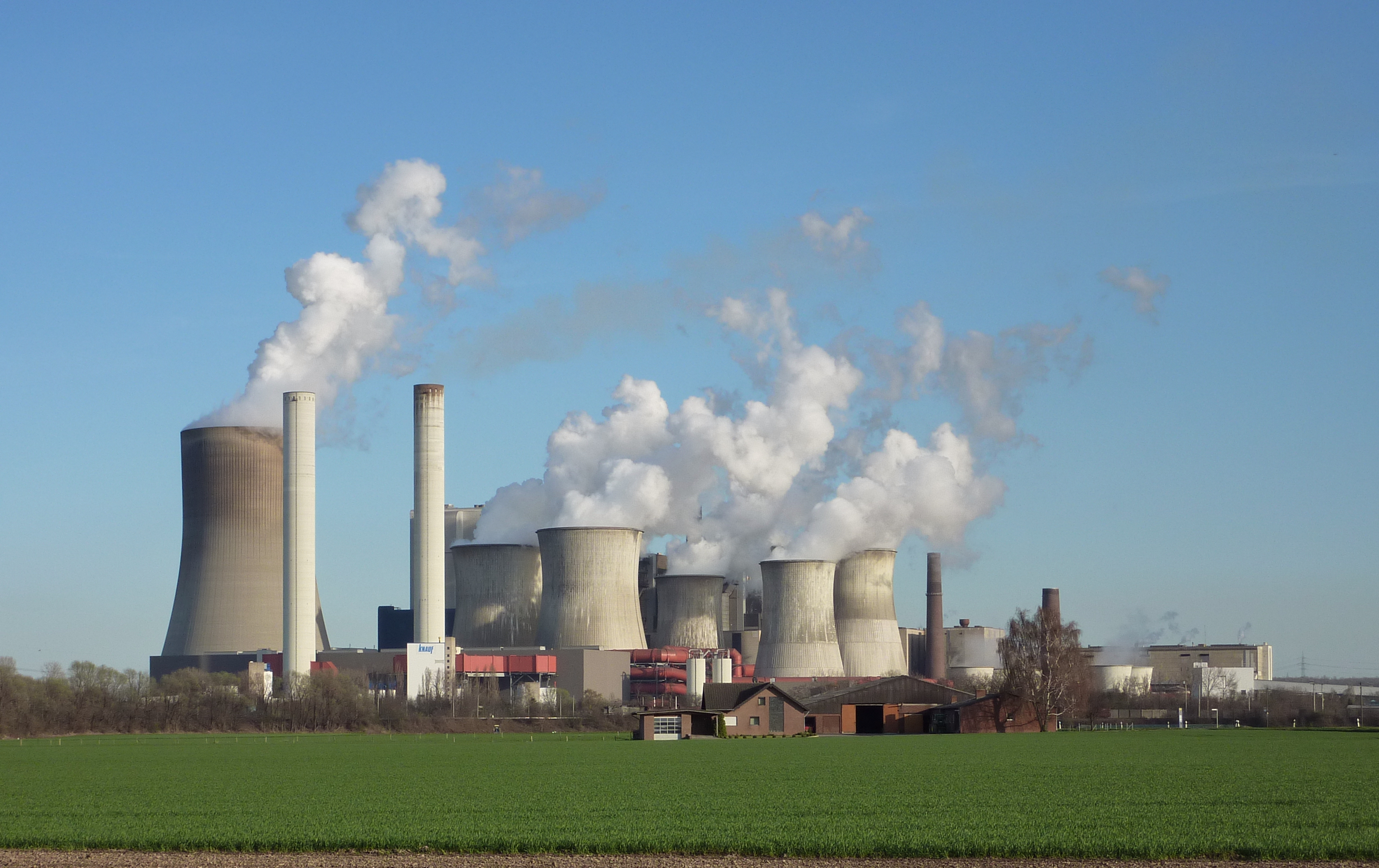 Ein Teil der Anlage von der Landstraße aus aufgenommen.